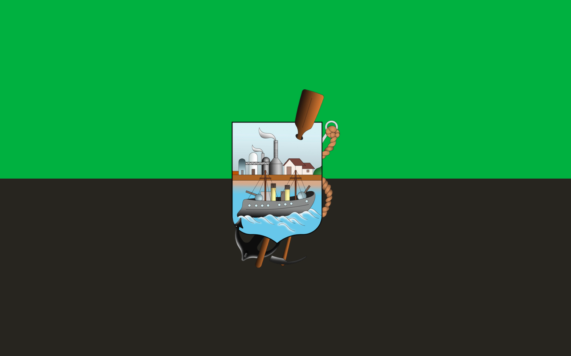 Bandera de Sestao